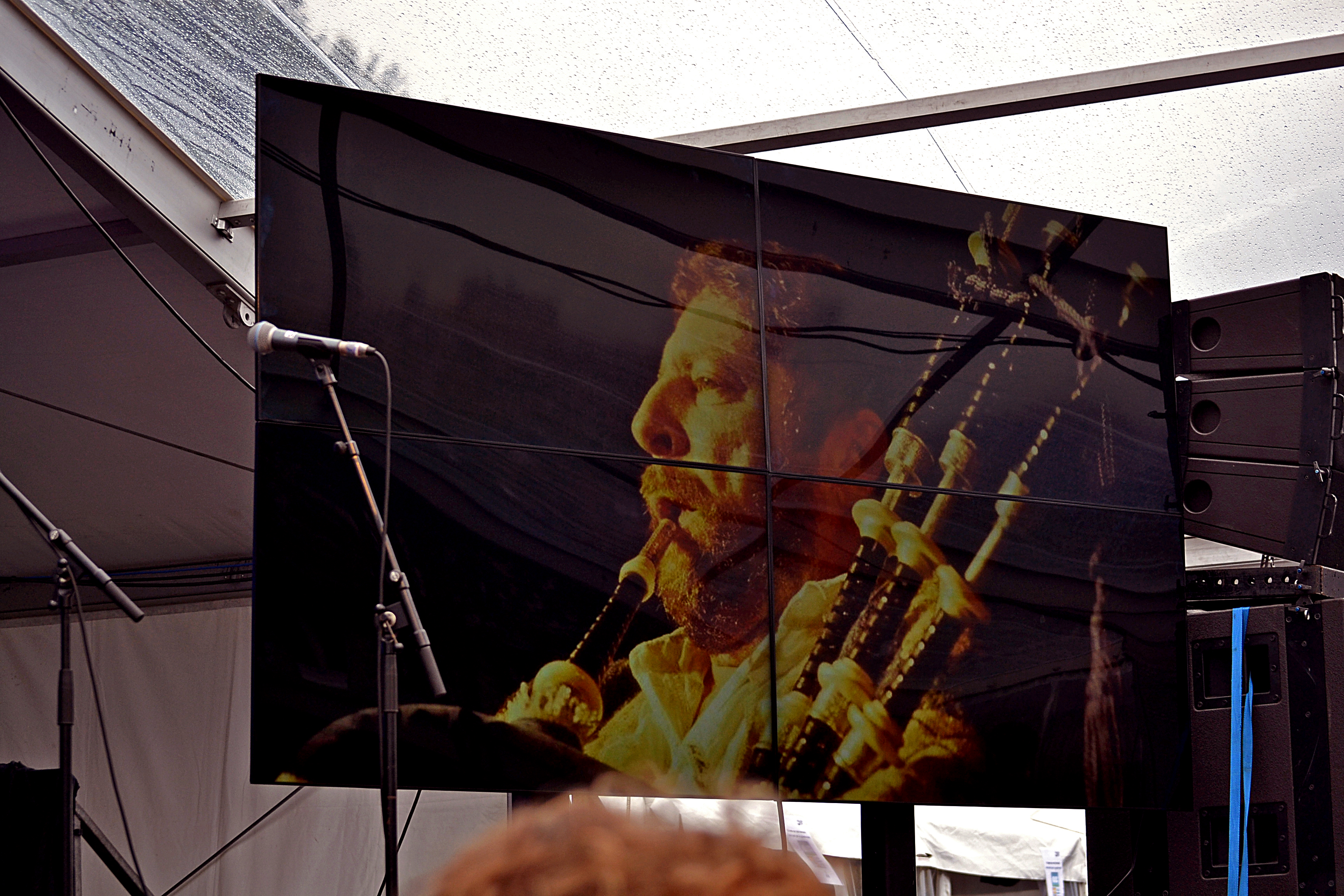 Hommage à Erwan Ropars place de la Résistance à Quimper en dans le cadre du festival Cornouaille 2015.